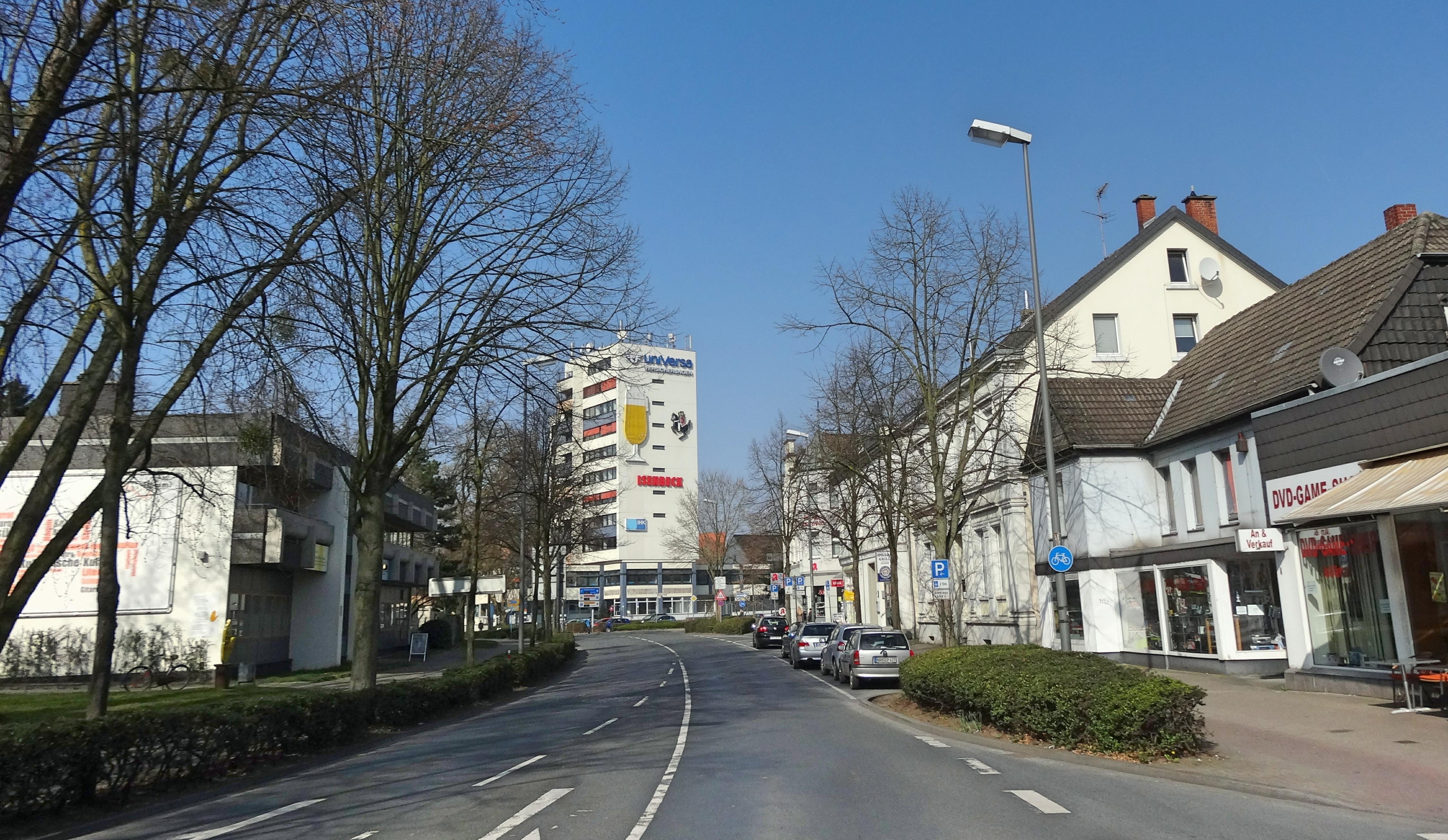 Hamm, Germany: Blick vom Theodor-Heuss-Platz die Südstraße entlang nach Norden